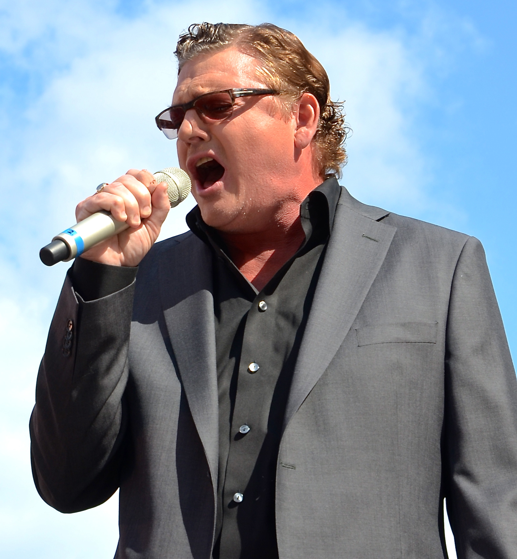 Dan Ekborg under Stockholms Kulturfestival 2012.